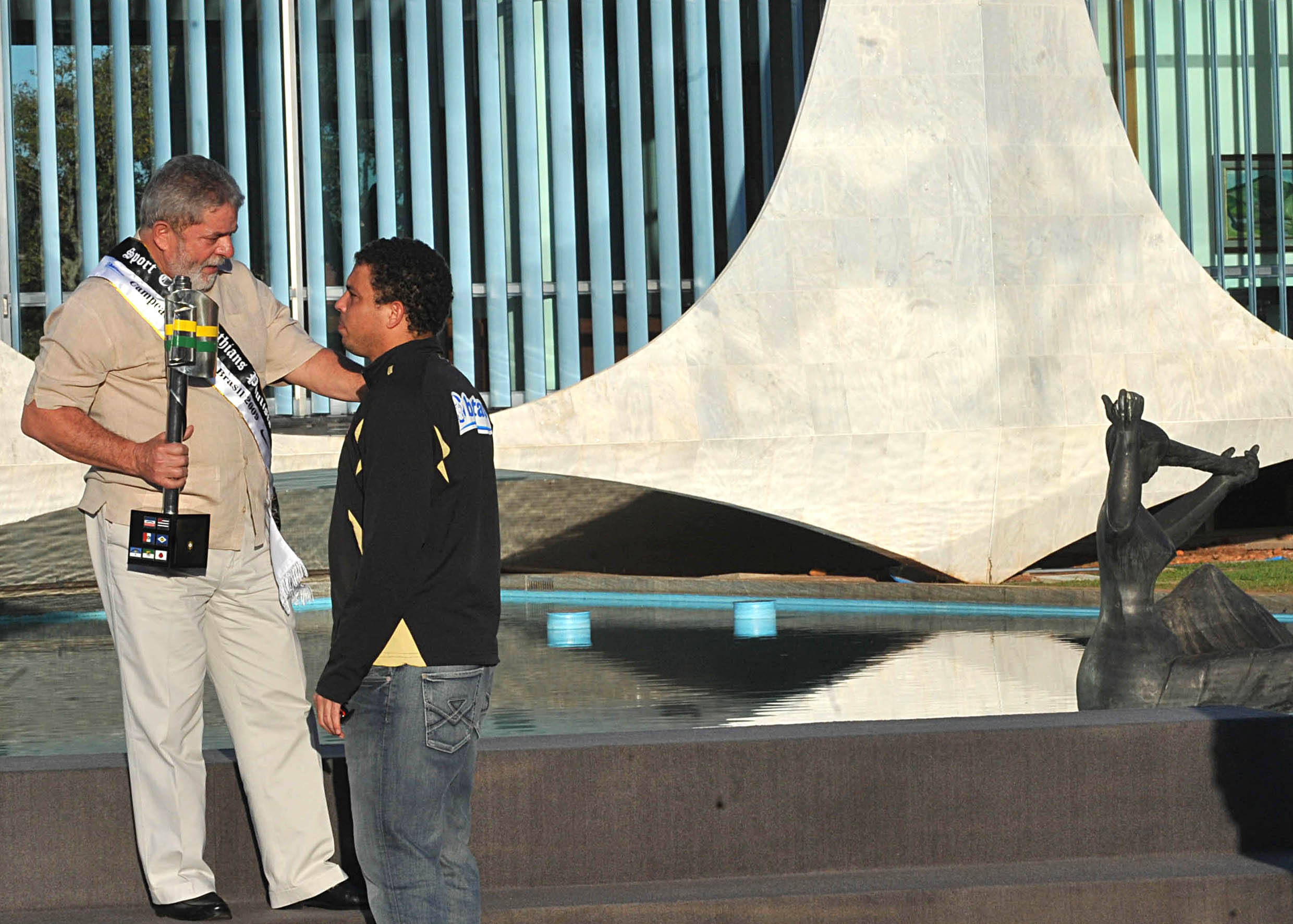 O presidente Lula recebe os jogadores do Corinthians no Palácio da Alvorada. Na foto, o presidente Lula conversa com o jogador Ronaldo